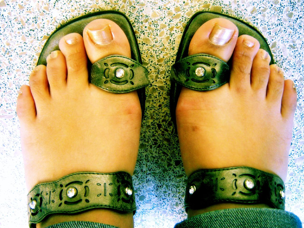 Feet in sandals